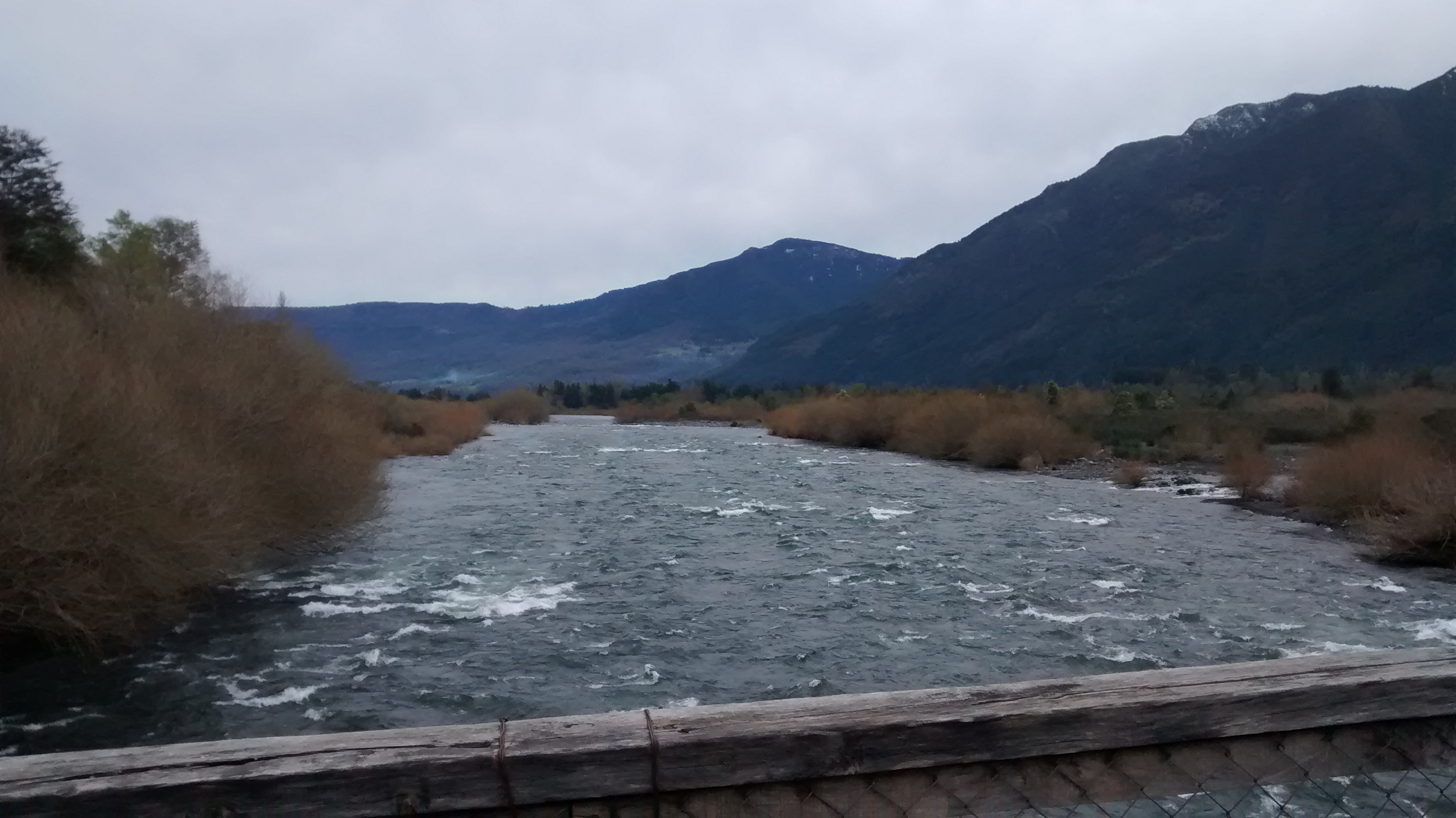 Río Trancura, en el Pasaje Quelhue, en Pucón, Chile